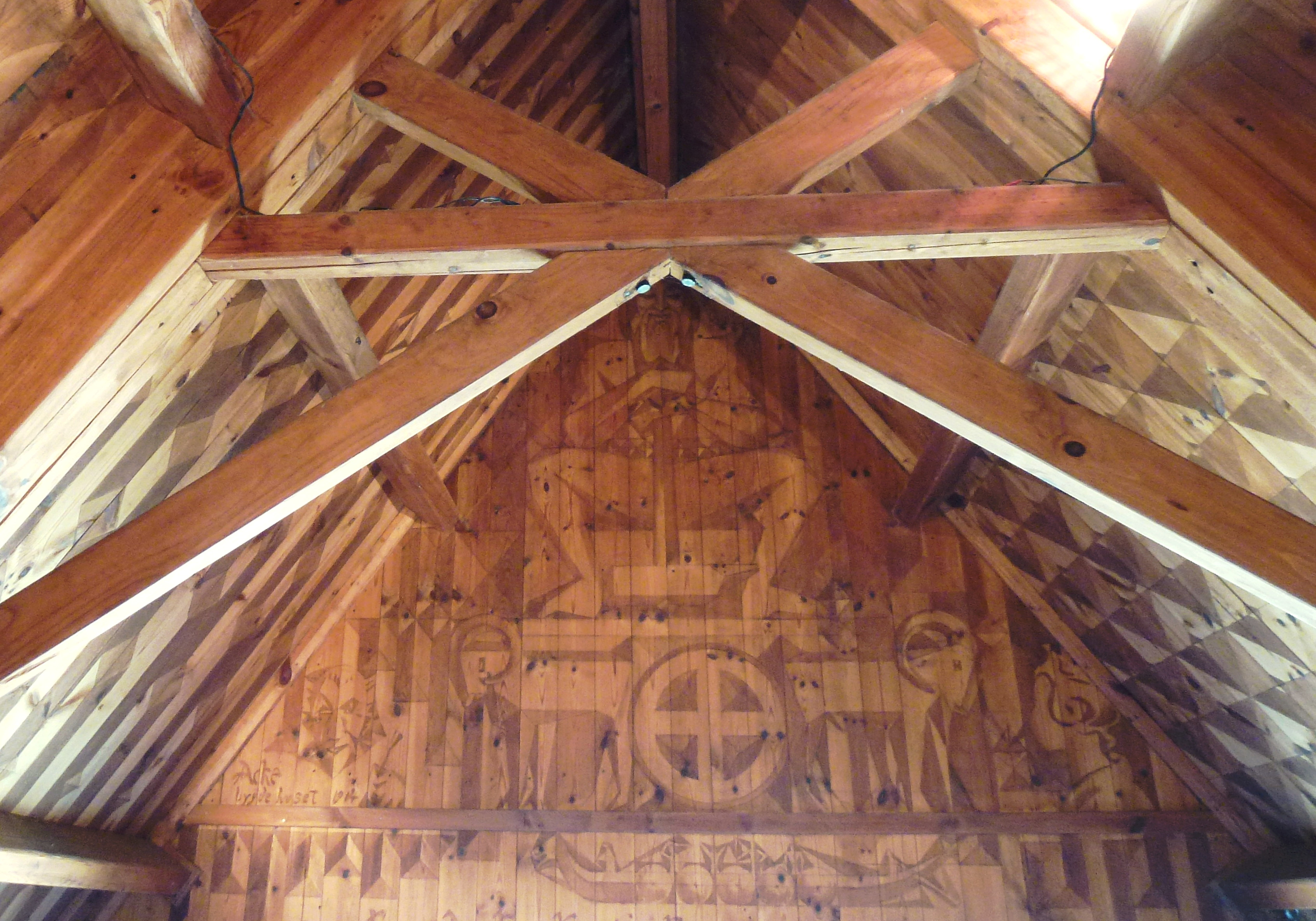 Villa Torsvi huvudbyggnad interiör